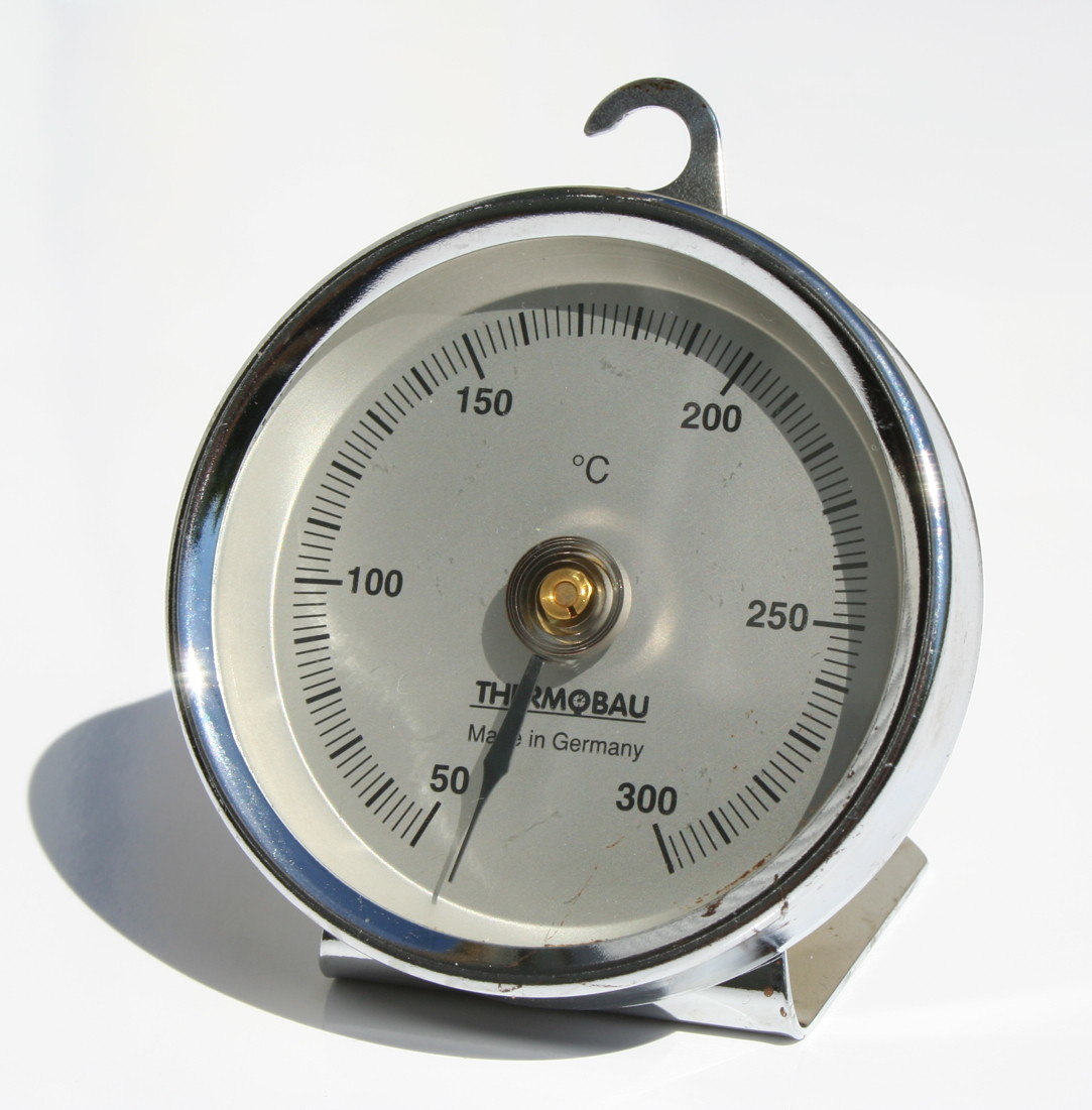 Backofenthermometer